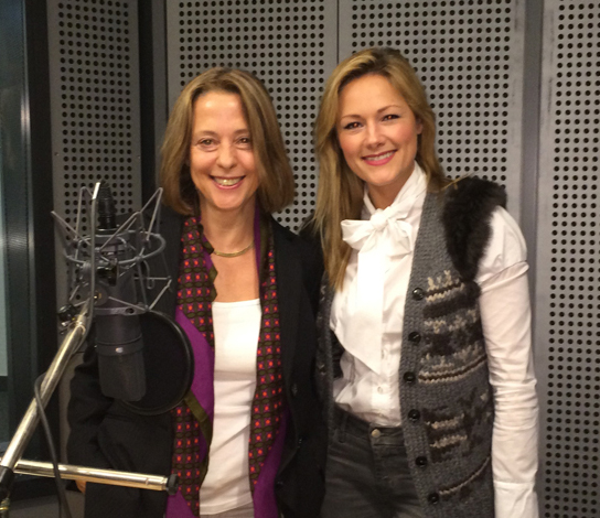 Moderation des Tischgesprächs mit Helene Fischer und Gisela Steinhauer